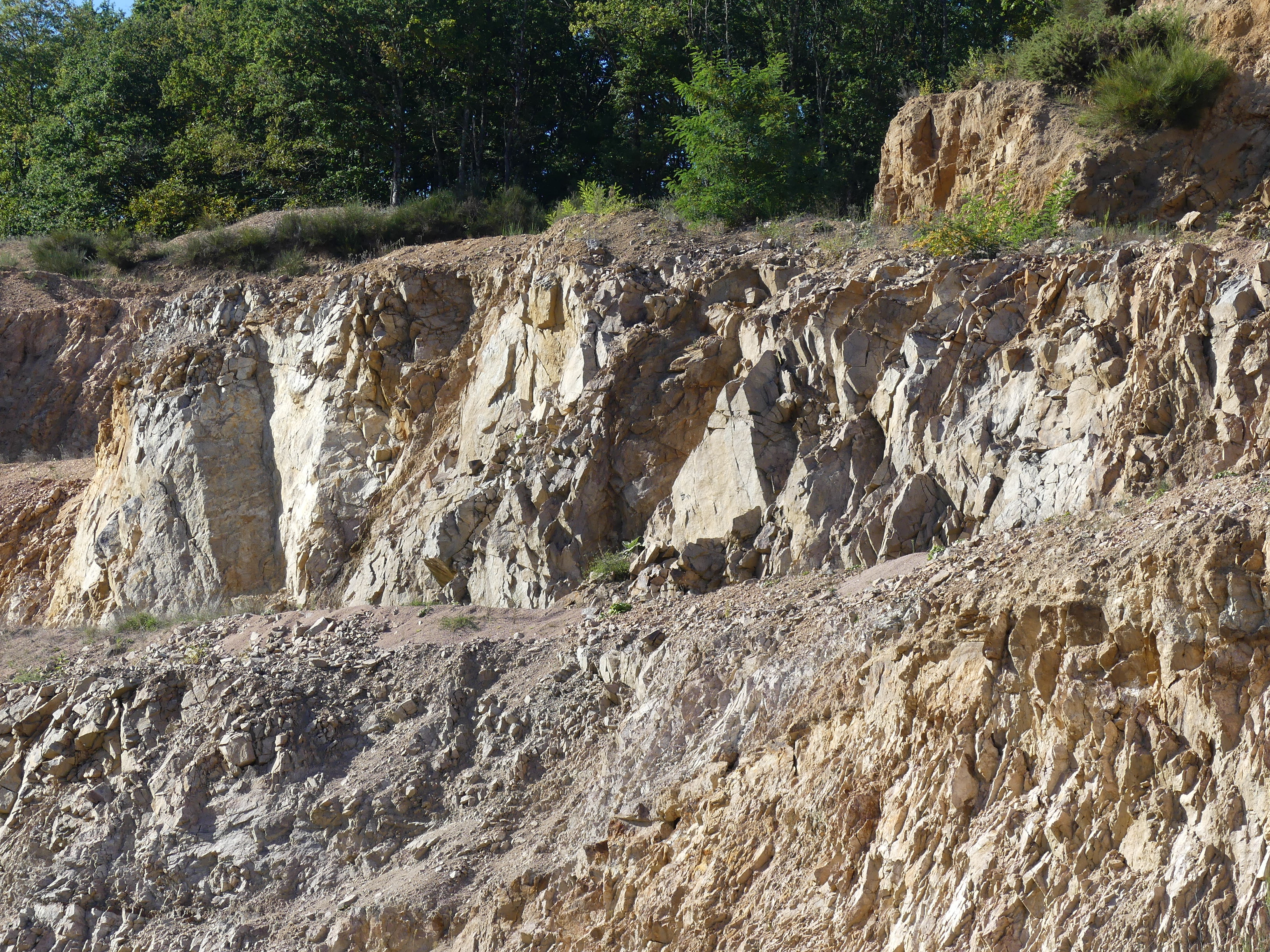 La carrière exploitée par la SEGRA à Abjat-sur-Bandiat, Dordogne, France.